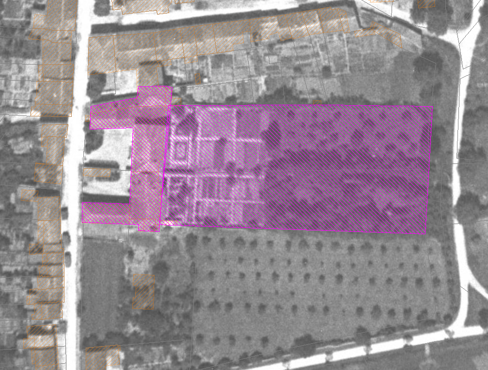 Bâtiments et jardins de la maison forte de Villers-en-Haye - (1932) réalisé sur le site : remonter le temps (IGN)